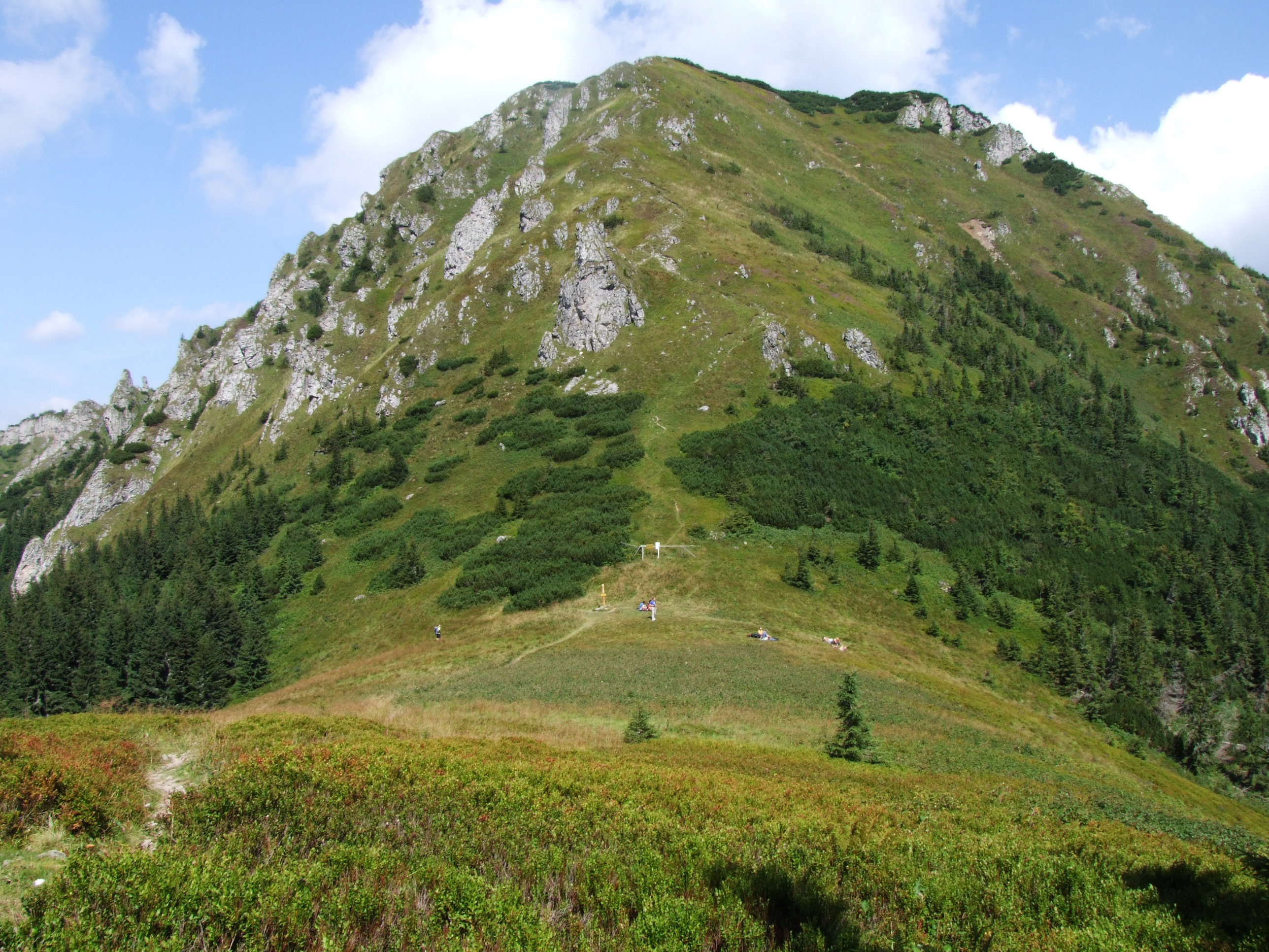 Osobita (West Tatra Mountains)